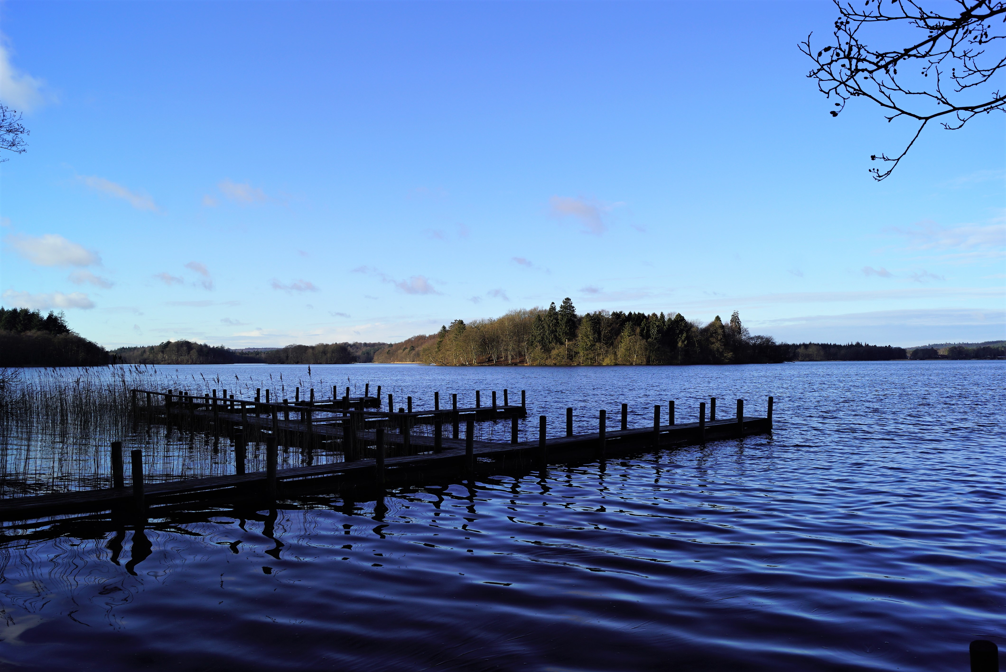 Borresø set mod nordvest med Boor Ø midt i søen. Set fra rutebådsbroen ved Slåensø